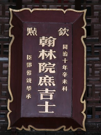 鄧蓉鏡於同治十年被欽點為翰林院庶吉士的功名匾